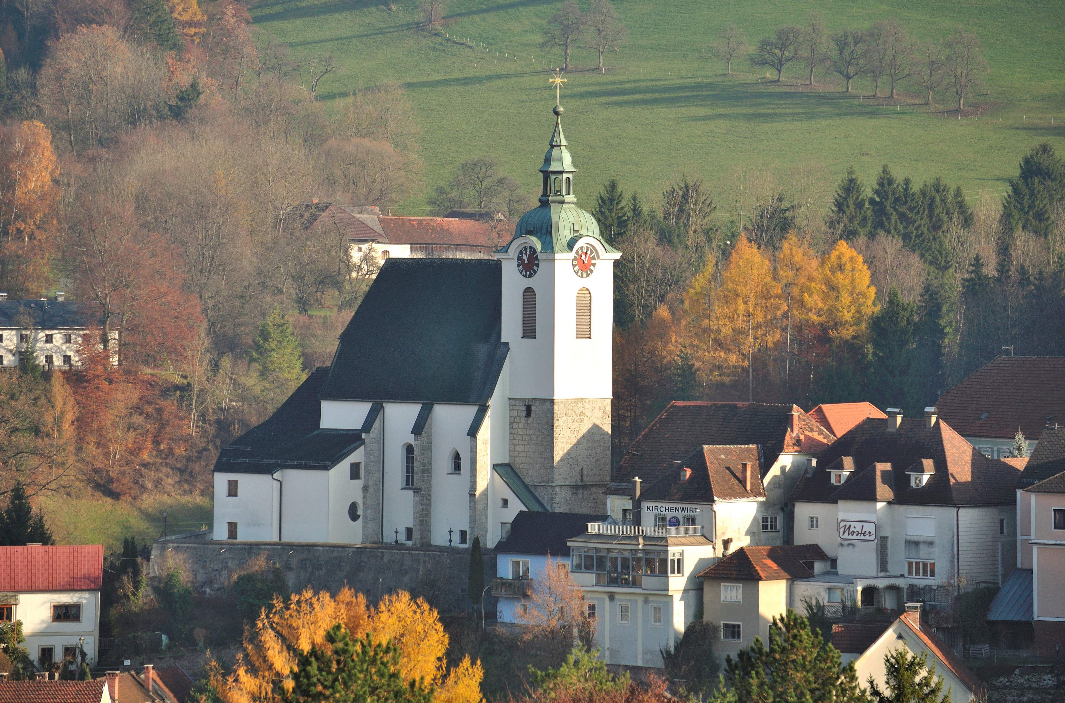 Kath. Pfarrkirche hl. Bartholomäus und Friedhof